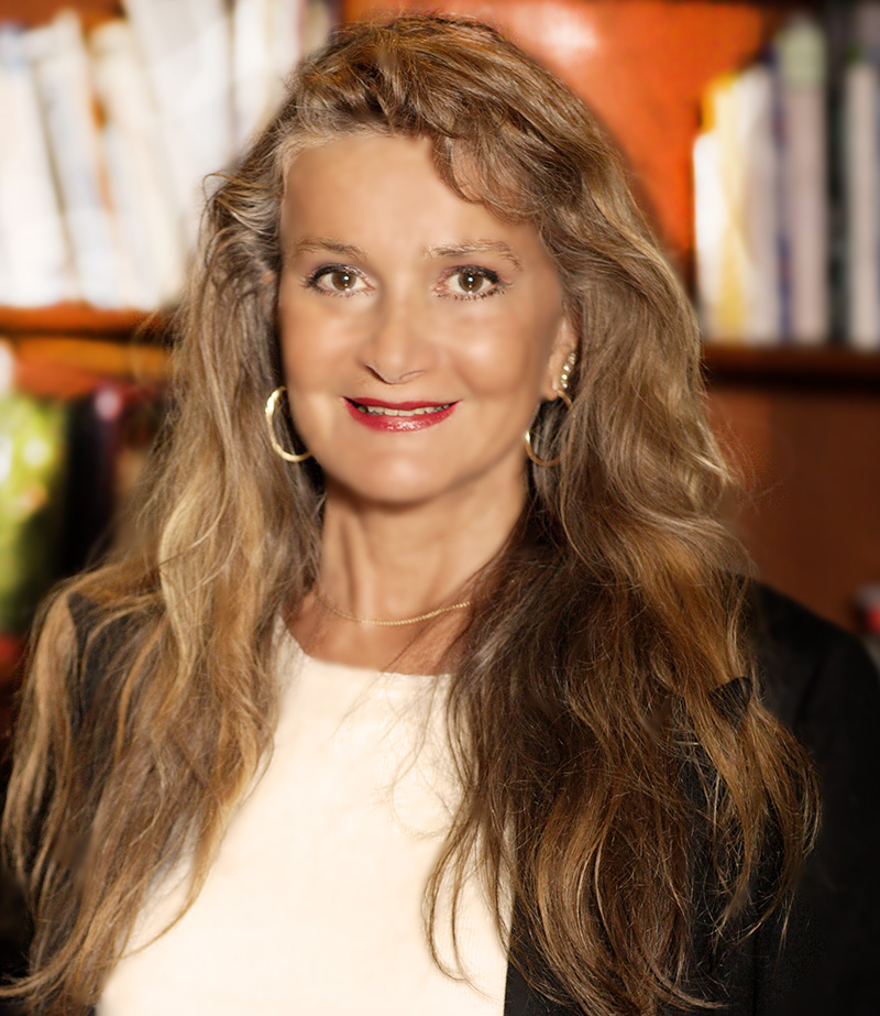 Clara Serina Etna Comics